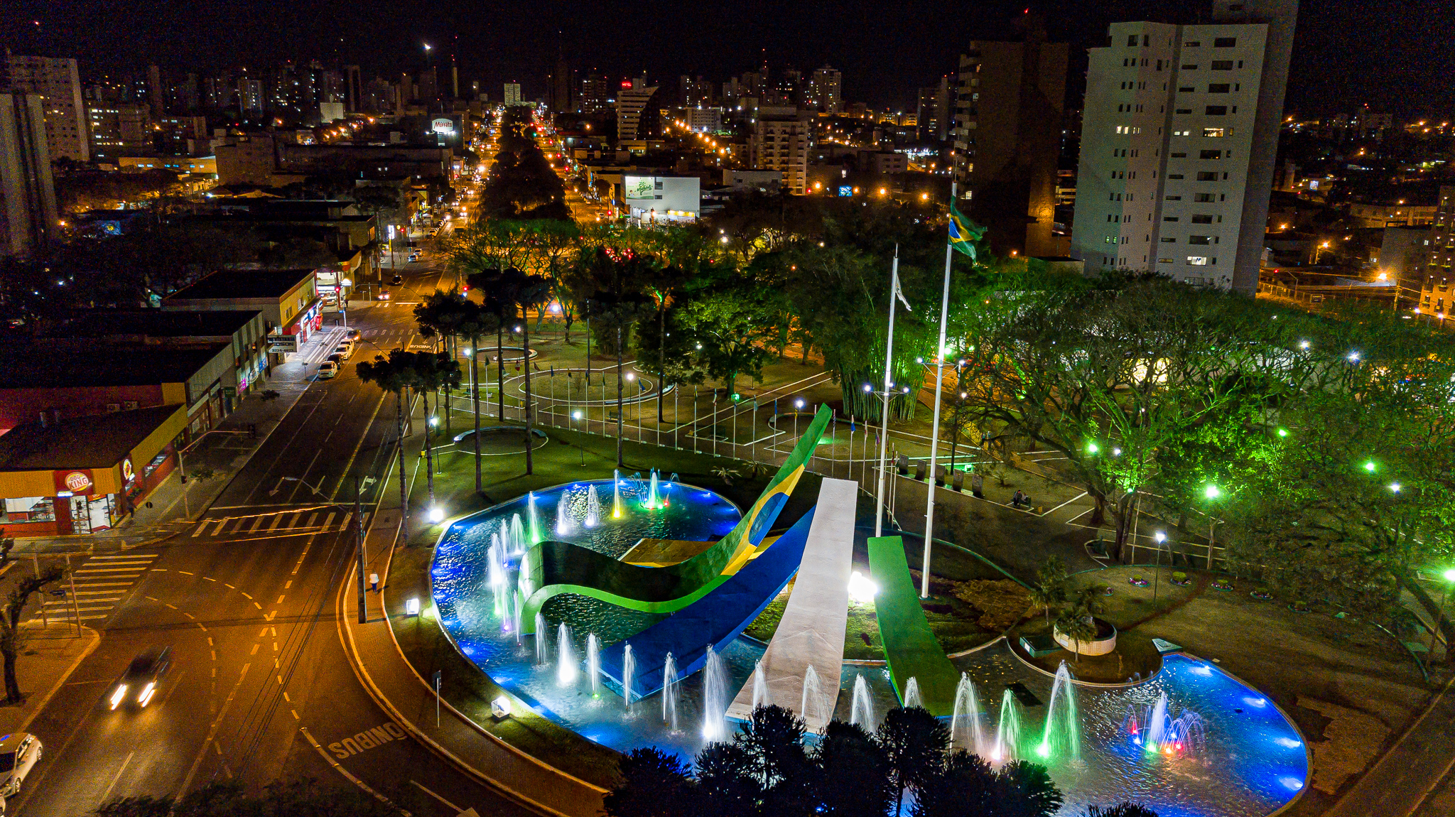 Foto Noturna de Drone na Praça do Migrante. Foto da Praça do Migrante tirada a noite com Drone por Fabio Covaleski